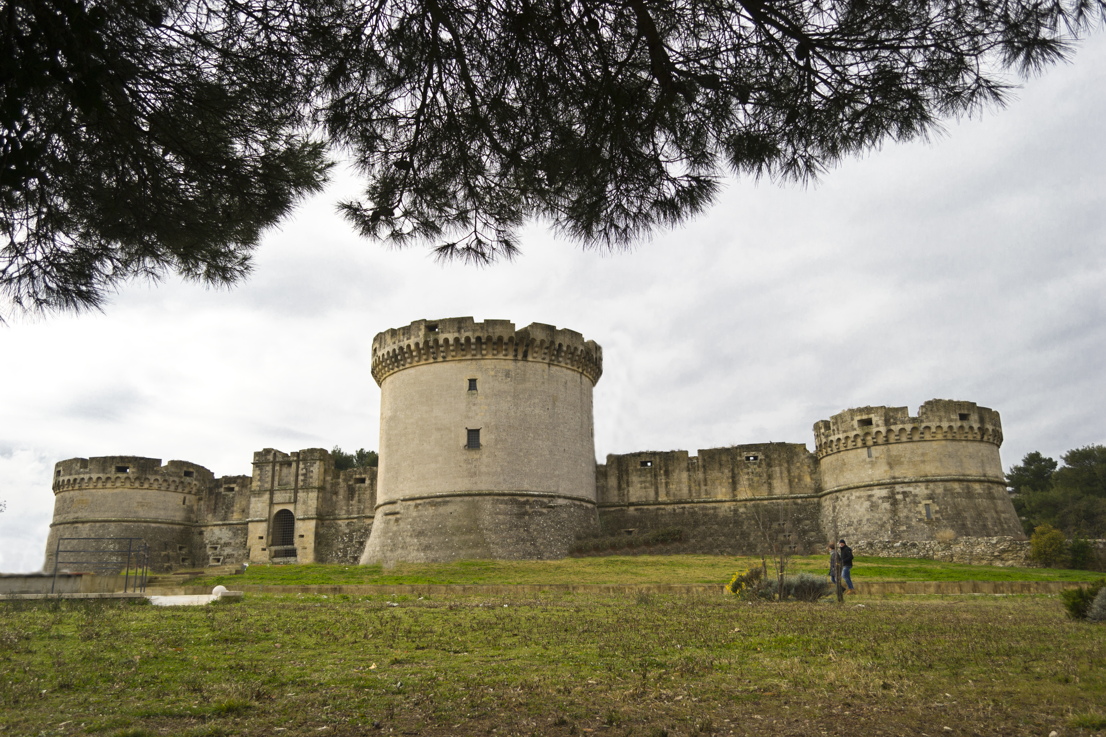 Castello Tramontano This is a photo of a monument which is part of cultural heritage of Italy.